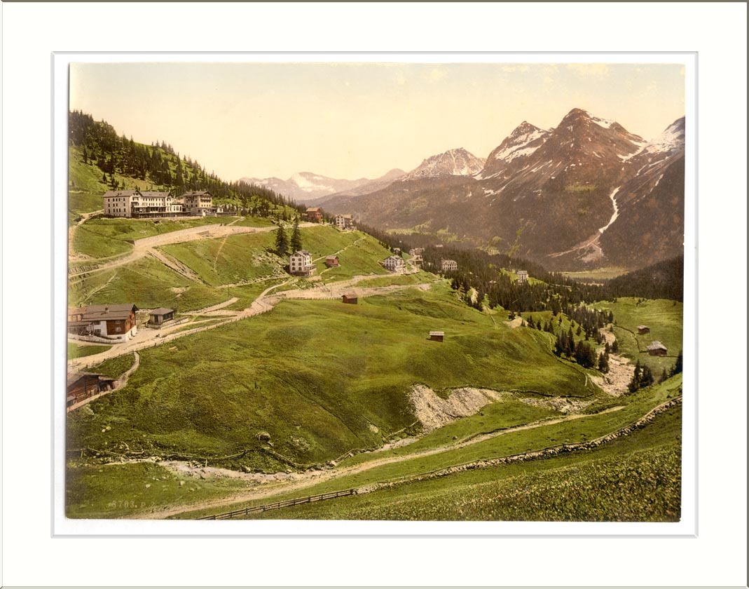 Arosa general view Grisons Switzerland